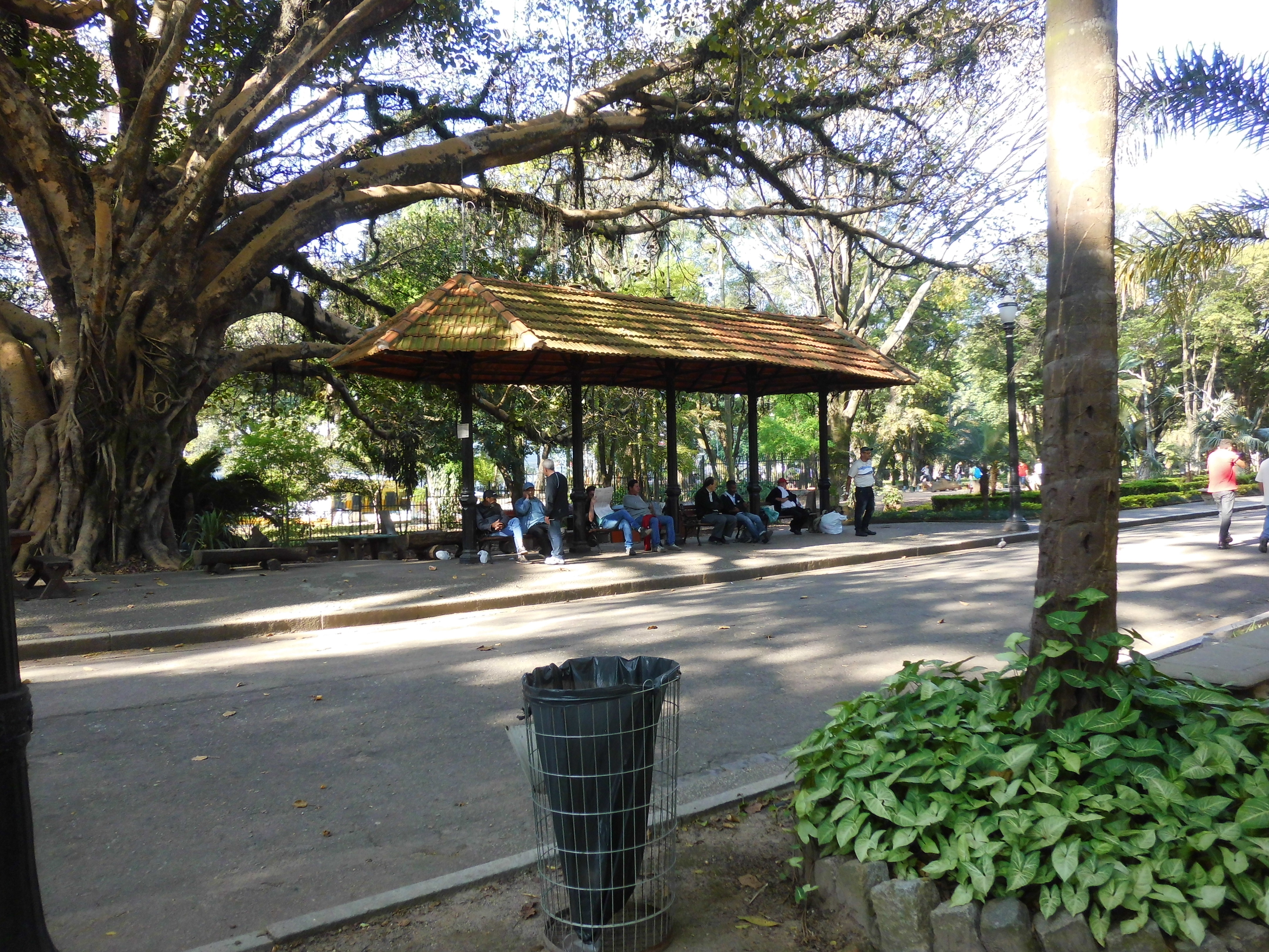 Interior do parque Jardim da Luz (São Paulo-SP, Brasil) com bancos para aos frequentadores do parque descansarem.